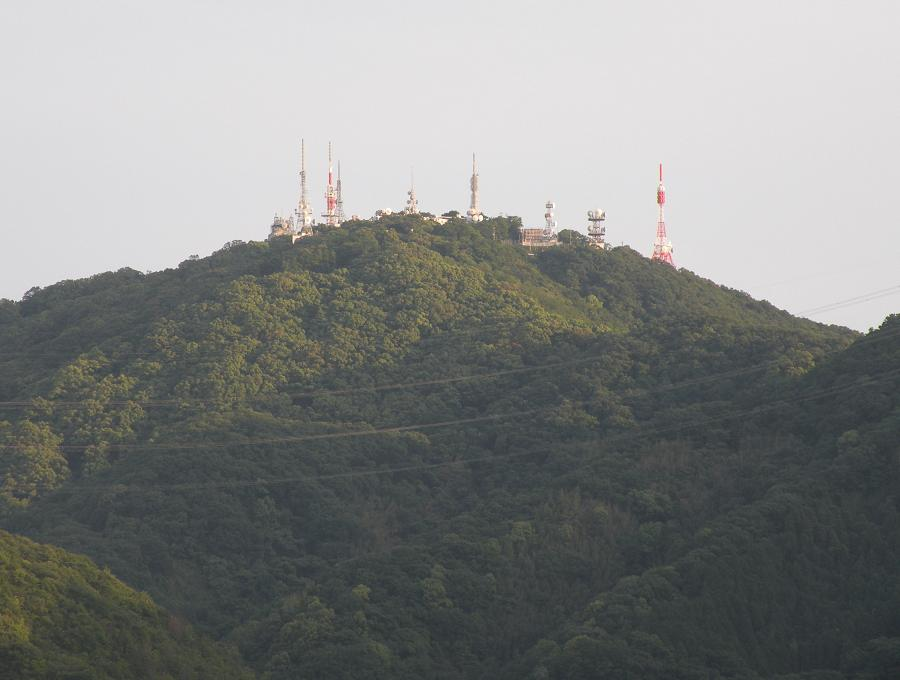 岡山市側から見た金甲山(岡山市南区北浦より撮影)